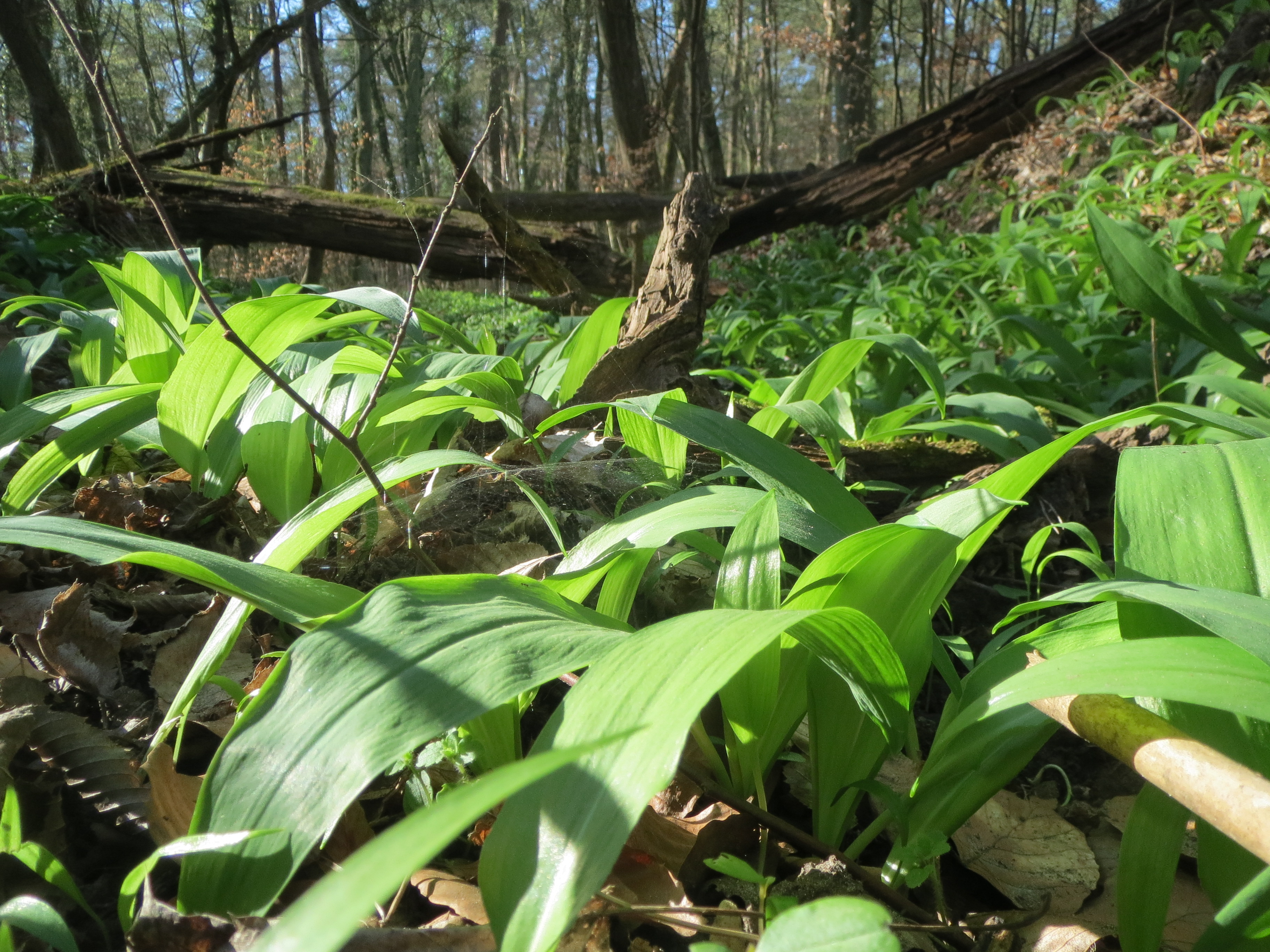 Bärlauch (Allium ursinum) im Schwetzinger Hardt